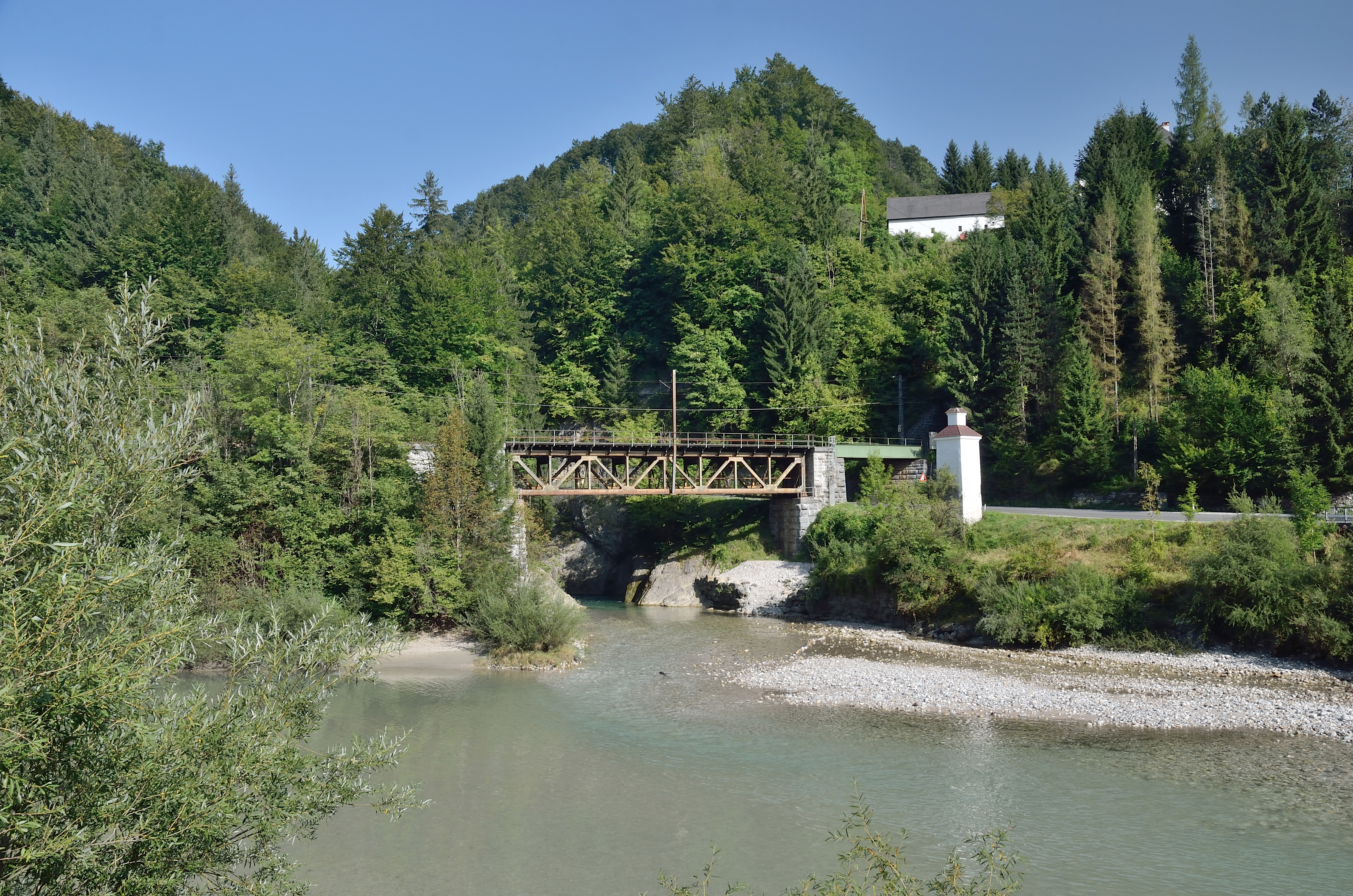 Mündung des Laussabaches in die Enns.